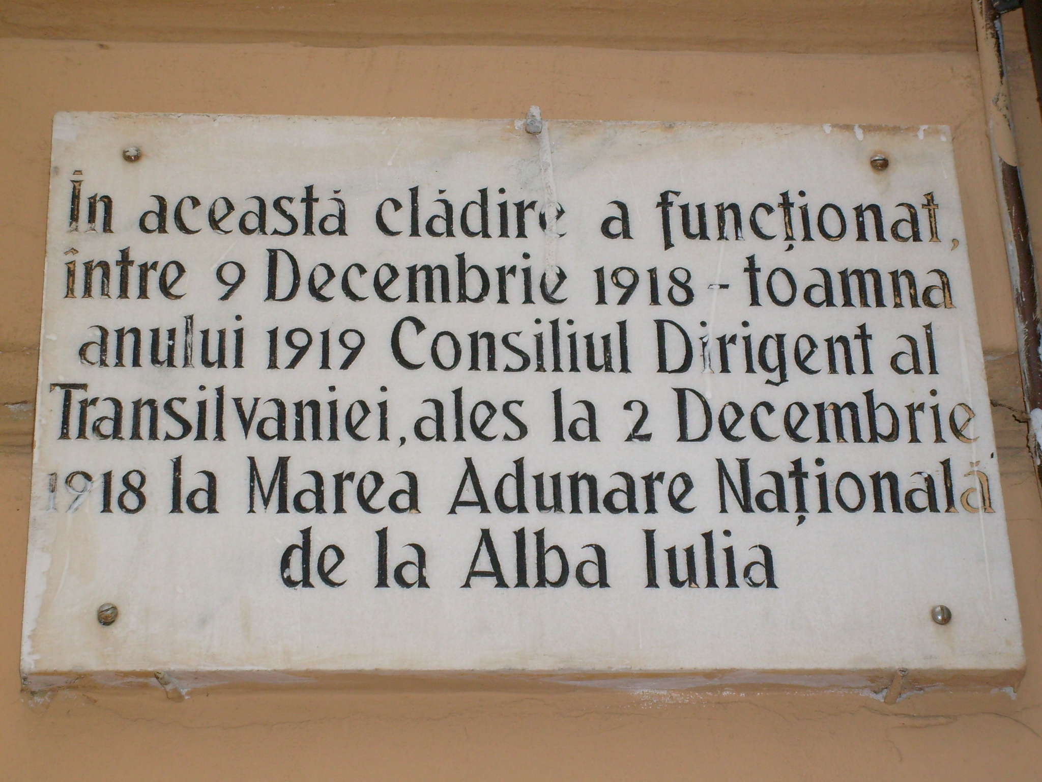 Sibiu: placa in amintirea Consiliului Dirigent al Transilvaniei.